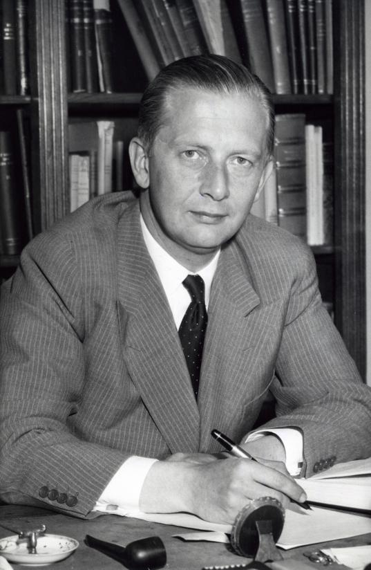 Portret van Drs Y. Scholten (1918-1984). Ynso Scholten. Staatssecretaris van Onderwijs, Kunst en Wetenschappen (1959-1963). Minister van Justitie in Kabinet Marijnen (1963-1965). Opname 15-06-1959 te Amsterdam.